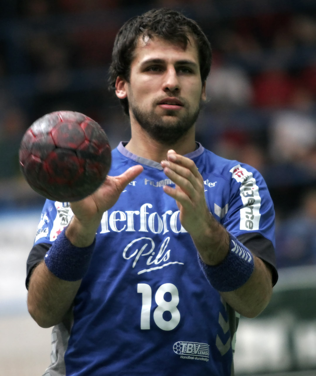 Tamás Mocsai, Spieler des TBV Lemgo, am 24. März 2007 im Spiel gegen den TV Großwallstadt in der Aschaffenburger Unterfrankenhalle